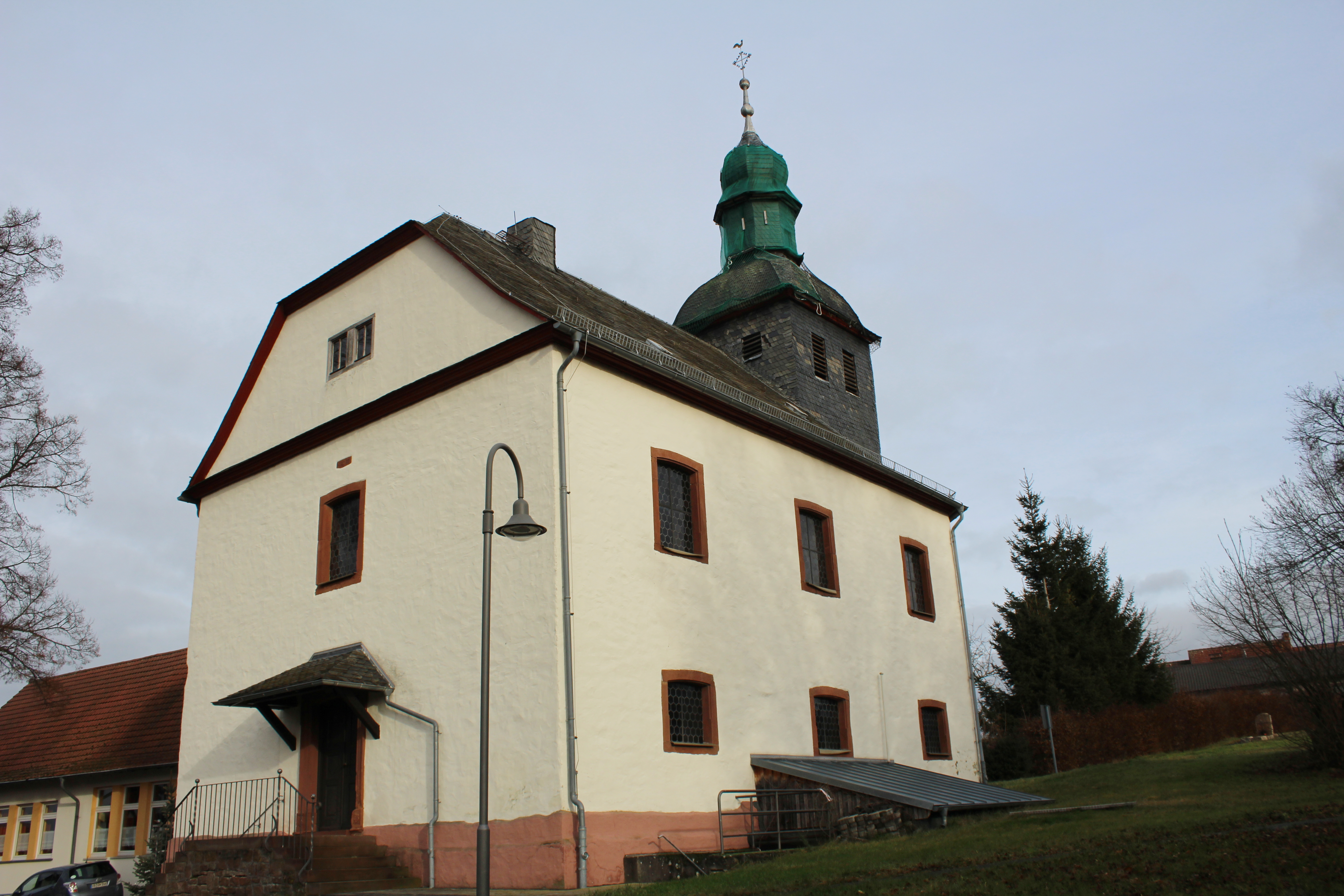 Evangelische Kirche Groß-Eichen, Gemeinde Mücke, Vogelsbergkreis, Hessen, Deutschland